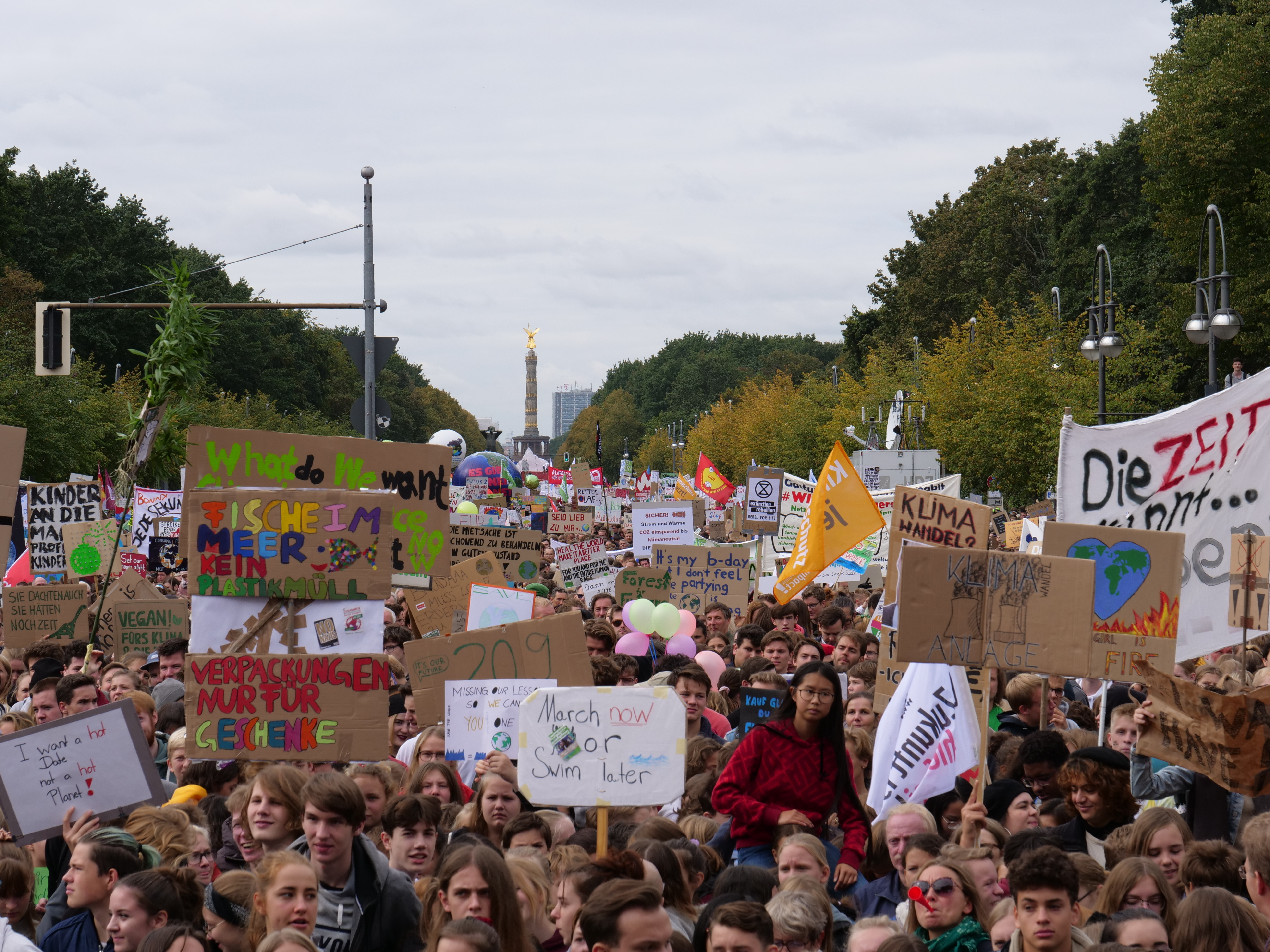 Blick von hinter der Bühne auf die Demonstration von FridaysForFuture am 20. September 2019 in Berlin.